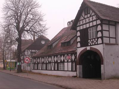 Iłowa, zabudowania przypałacowe - główna brama do Parku Miejskiego